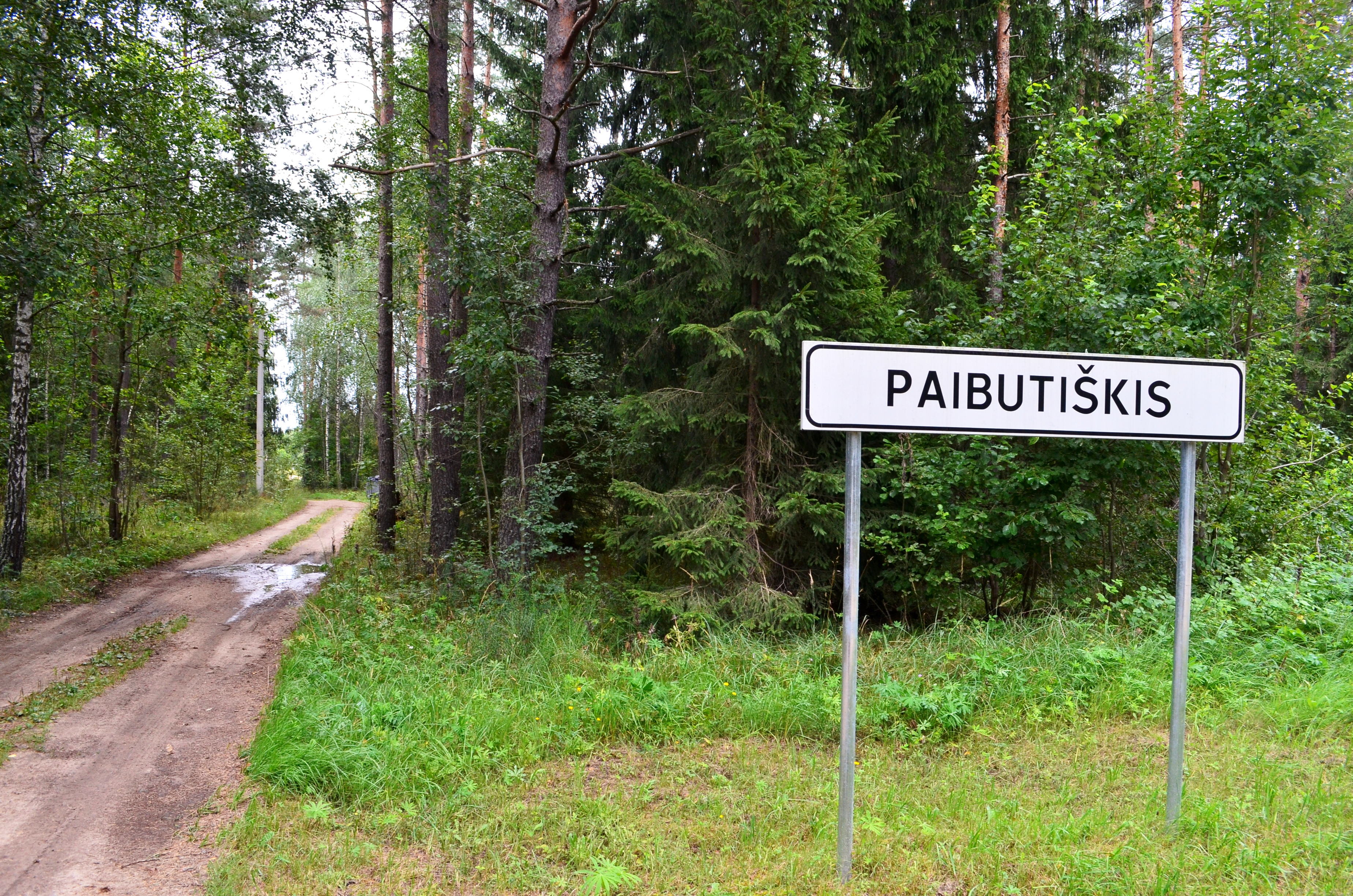 Paibutiškis, Labanoro sen., Švenčionių raj.